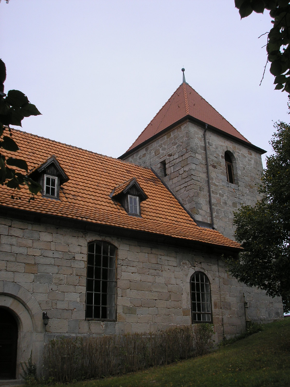 Die Friedhofskirche St. Andreas in Ummerstadt (Thüringen).